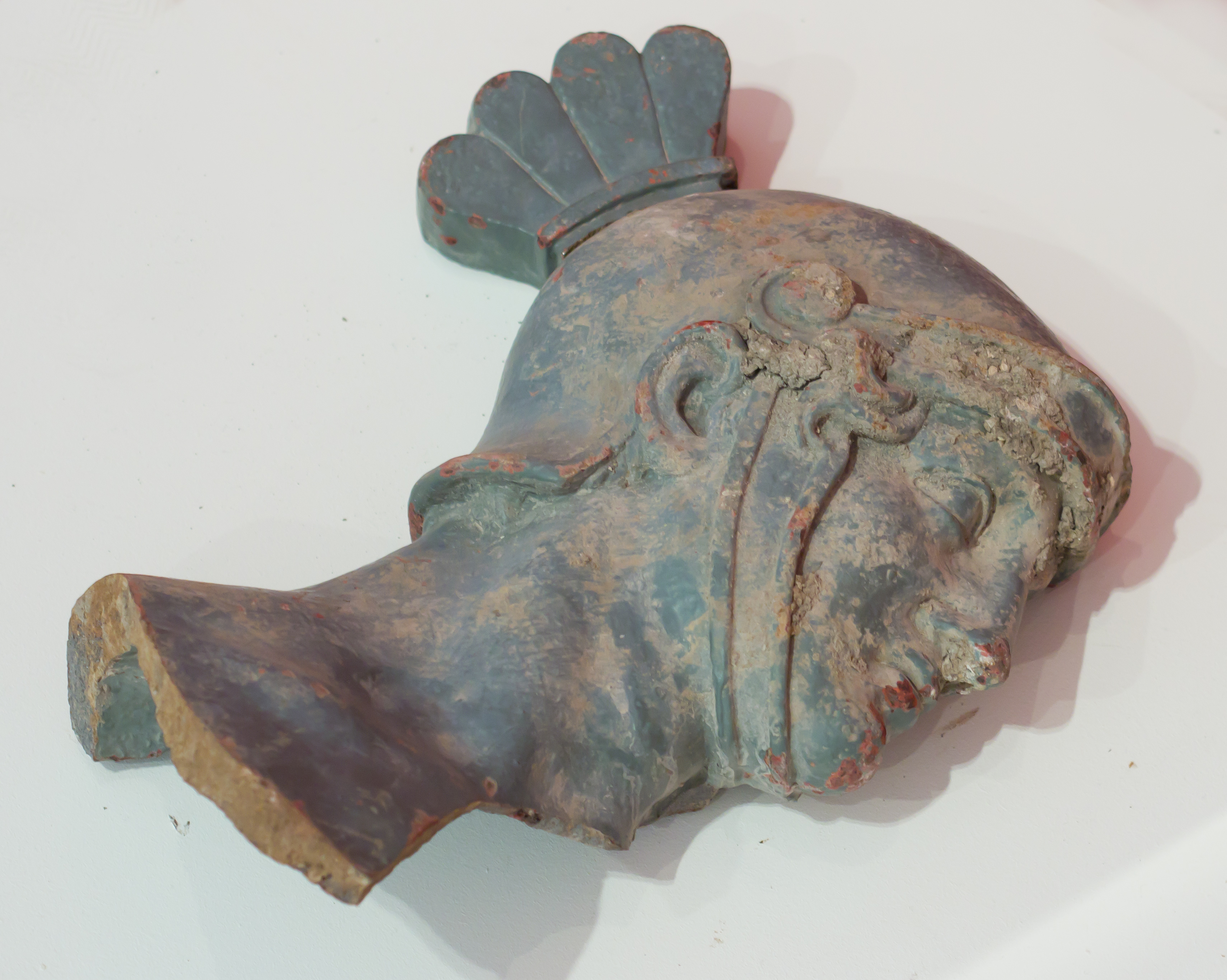 Relikt des Giebelfrieses der Alten Wache in Köln (Severinstraße). Das Gebäude wurde nach dem Einsturz des Stadtarchives abgerissen. Objekt in der Ausstellung „Der Waidmarkt. Drunter und Drüber“ im Kölnischen Stadtmuseum Cologne City Museum Native nameKölnisches StadtmuseumLocationCologneCoordinates50° 56′ 28.58″ N, 6° 57′ 00.6″ E Established1888WebsiteKölnisches StadtmuseumAuthority control VIAF: 262996820 GND: 2015828-2